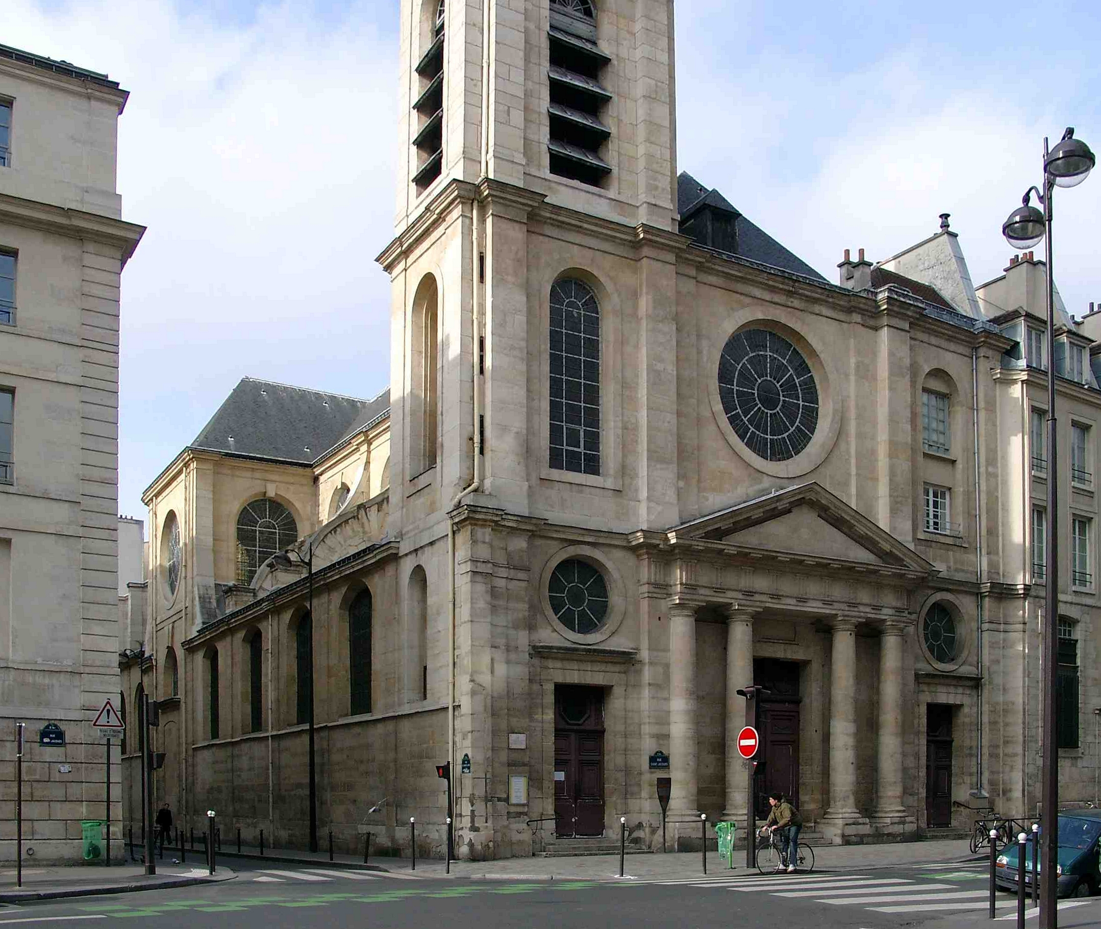 Kirche St Jacques-du-Haut-Pas, rue St-Jacques, Paris